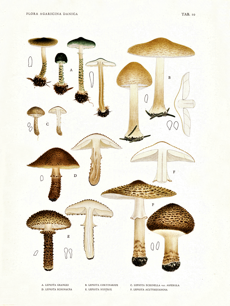 Jakob Emanuel Lange: Lepiotagattungen